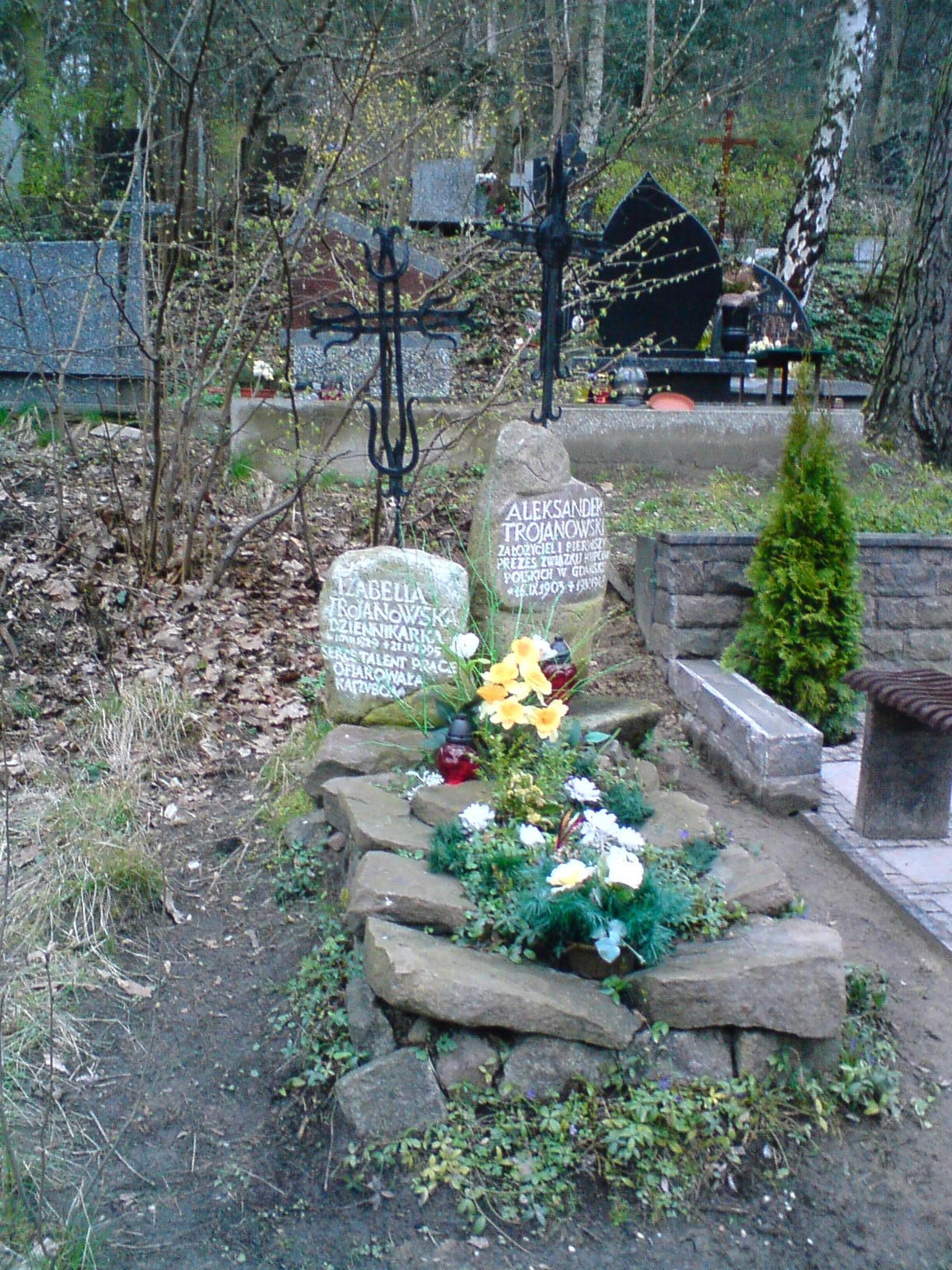 Grave of Izabella Trojanowska on Srebrzysko Cemetery in Gdansk, Poland.